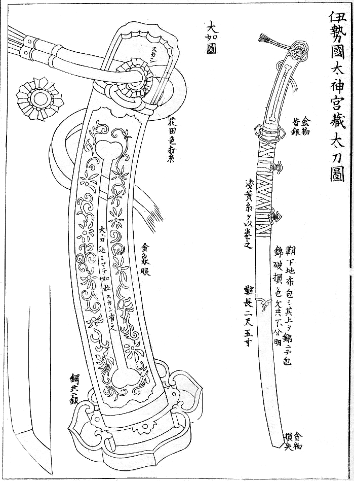 『集古十種』刀剣之部 伊勢国太神宮蔵太刀図